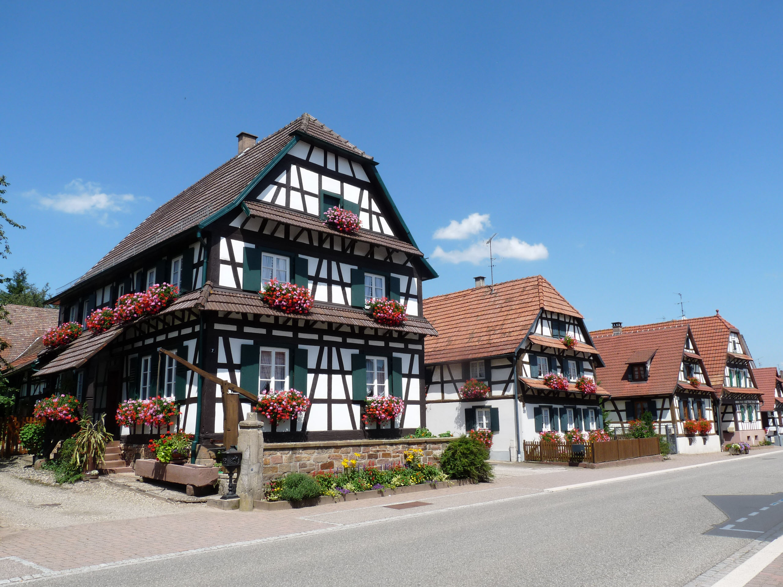 Maisons à colombages et fontaine à balancier à Betschdorf (Bas-Rhin)